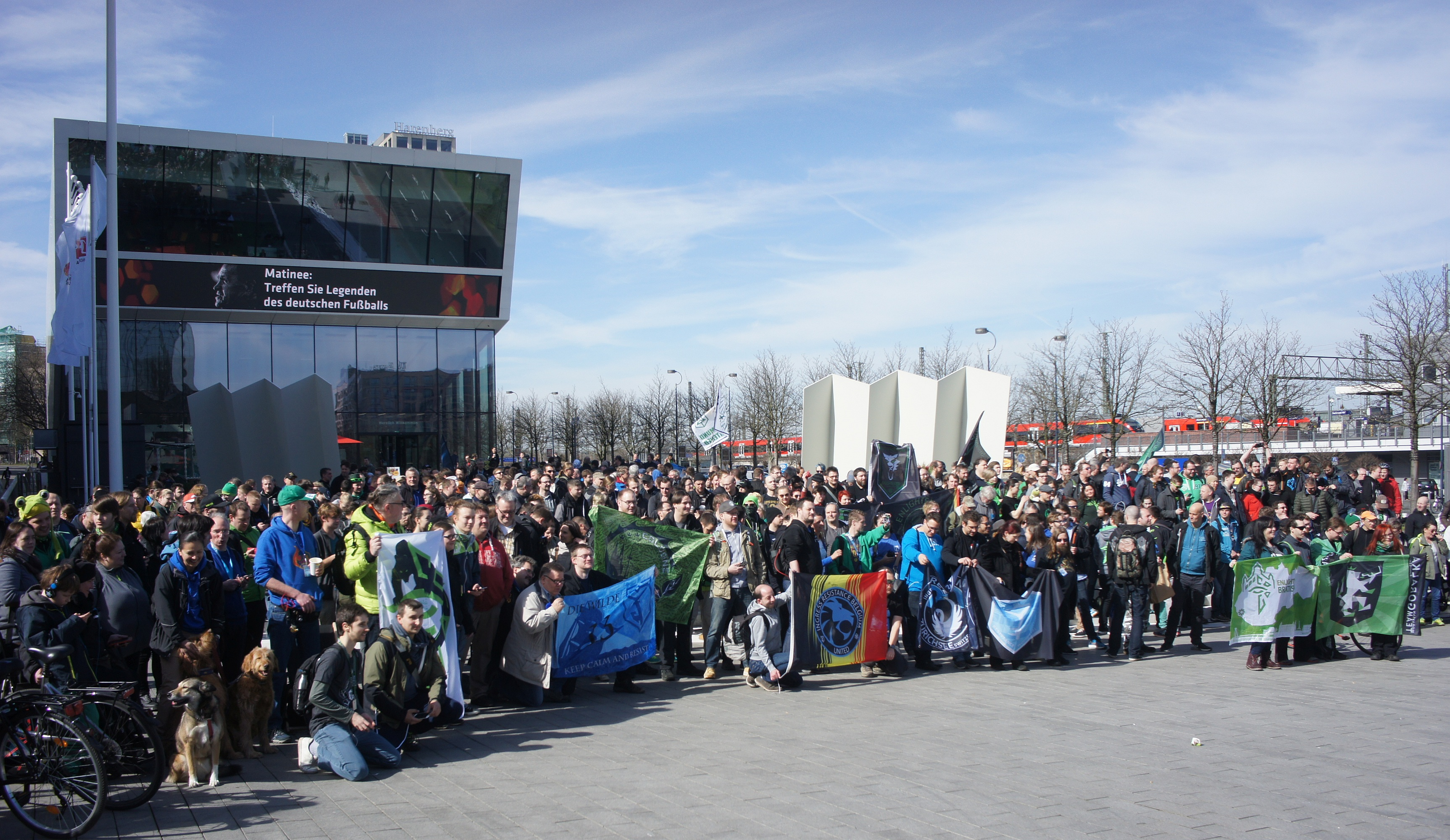 Gruppenfoto vor dem Fußballmuseum beim Ingress Mission Day Dortmund